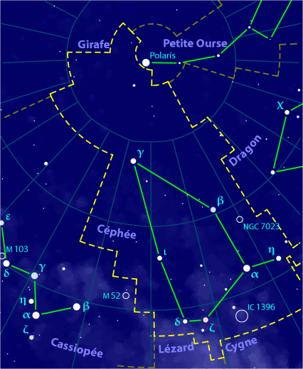 Carte pour la constellation Céphée Produite à l'aide du logiciel PP3